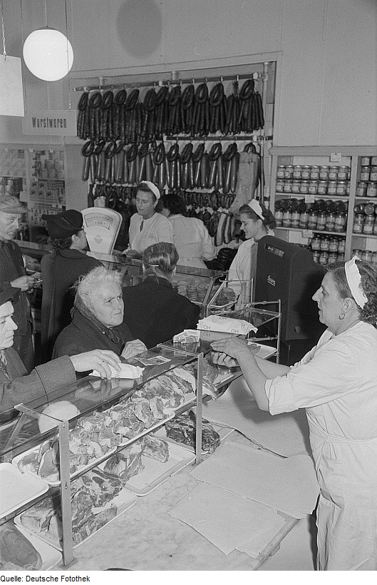 Original image description from the Deutsche Fotothek Verkäuferinnen bedienen Kunden einer Fleisch- und Wursttheke